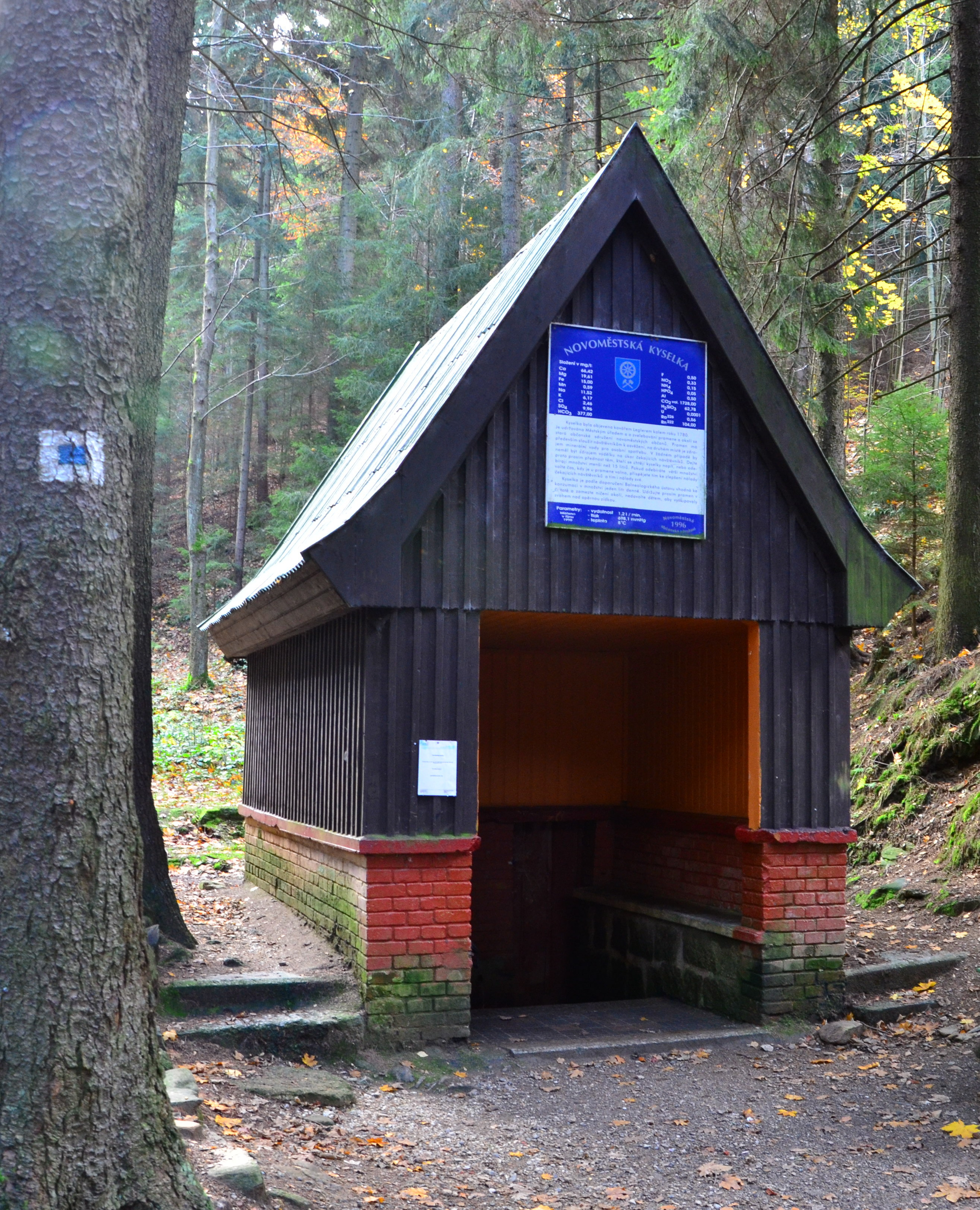 Pramen kyselky - Nové Město pod Smrkem